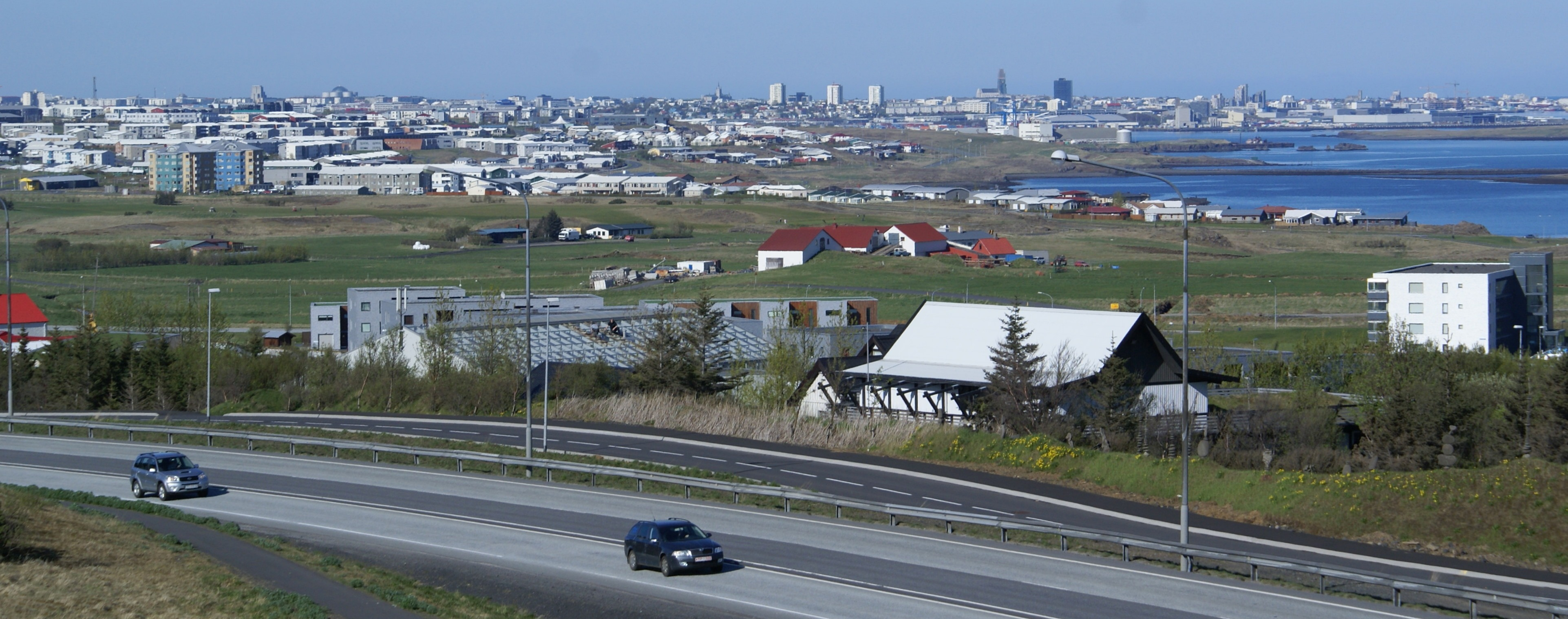 Mosfellsbær (einnig kallað Mosó er sveitarfélag sem liggur norðaustan við Reykjavík.